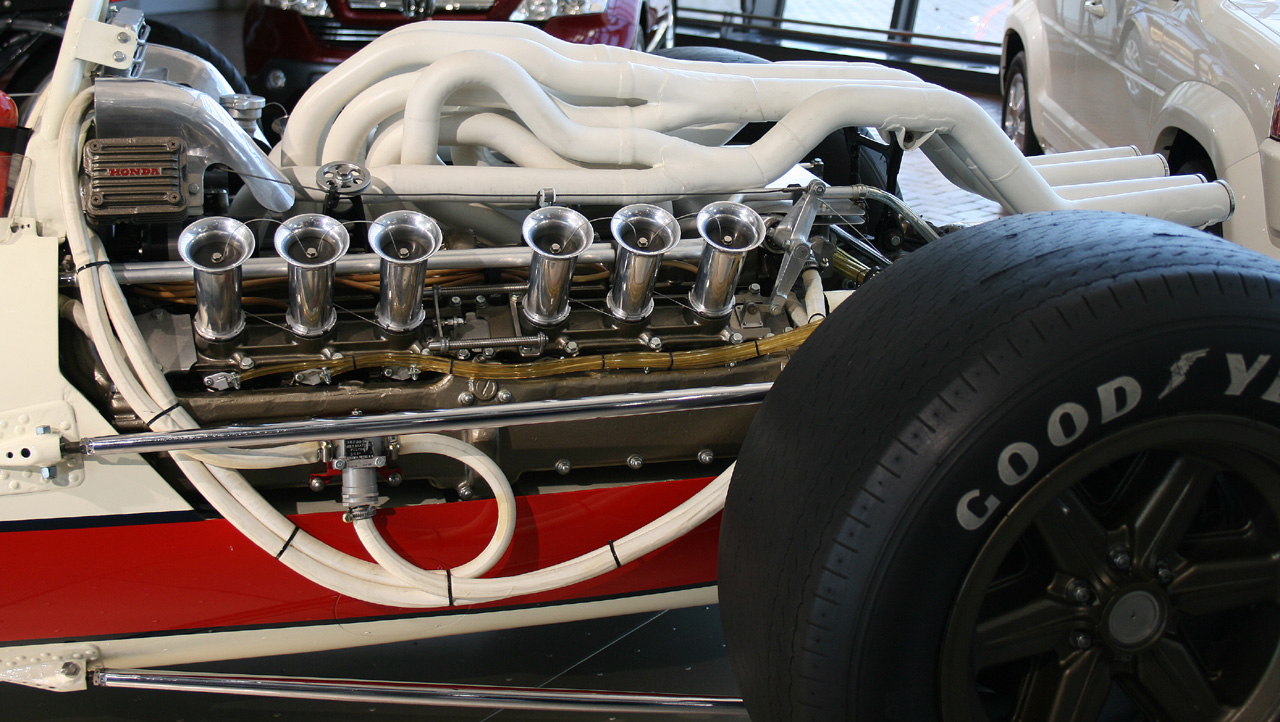 Honda RA273E engine